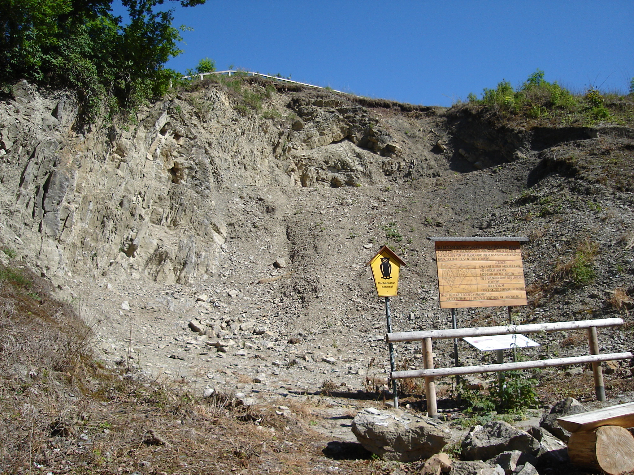 Der Steinbruch (Flächennaturdenkmal) von Haarhausen als Teil des Geoparks Drei Gleichen.